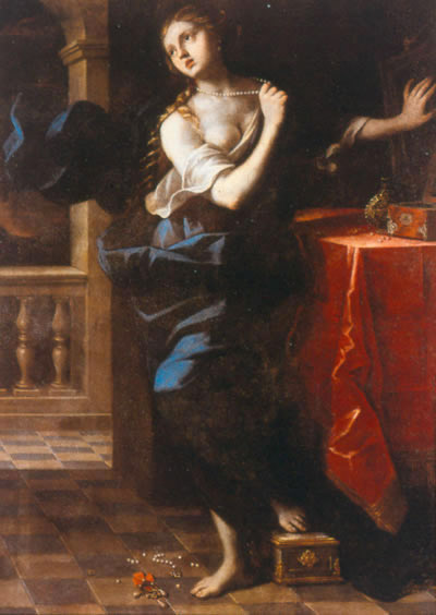 La obra representa a Santa María Magdalena arrepentida de sus pecados.